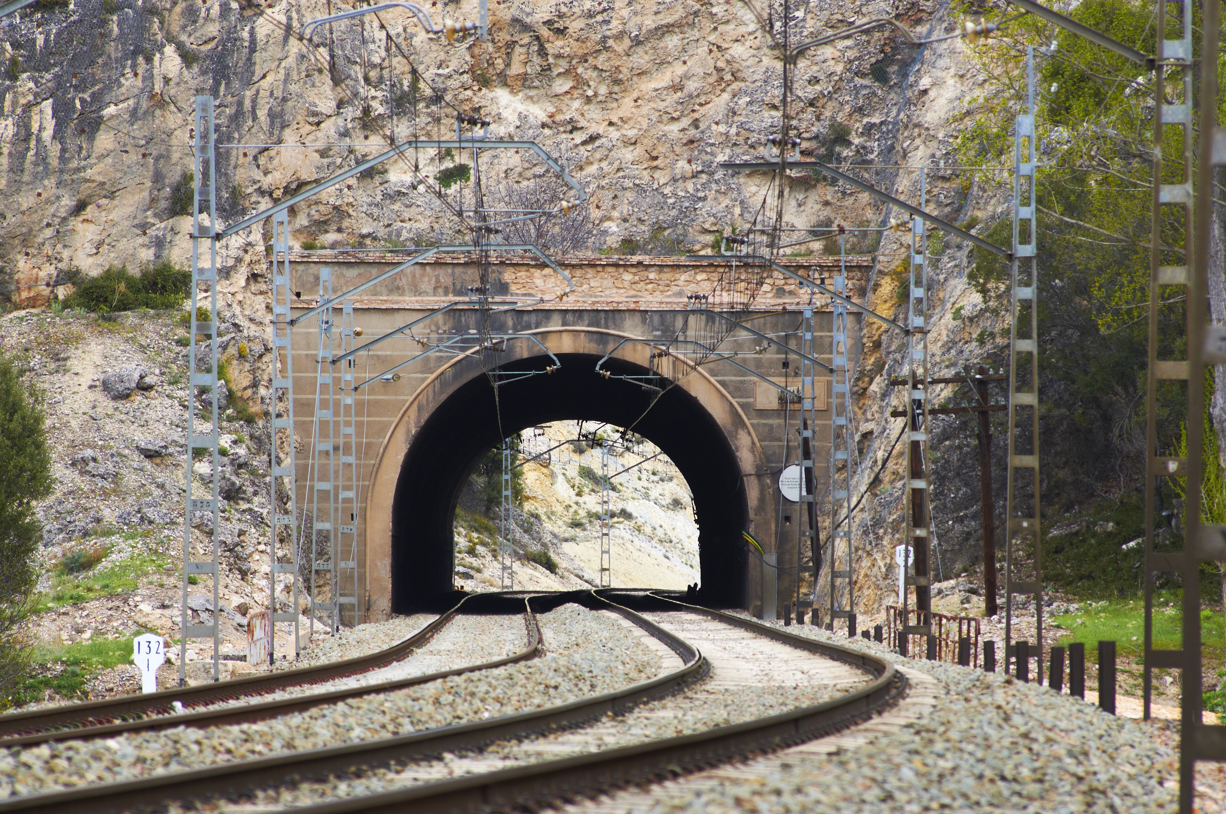 Túnel de Cutamilla